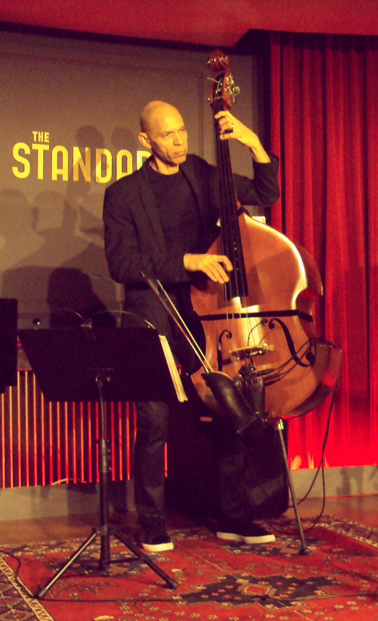 Kopenhagen, 13. Dez. 2014, The Standard (Jazz Club): Edda Magnason (Gesang, Piano) & Niels Lan Doky Trio featuring Ira Coleman (Bass) & Niclas Bardeleben (Schlagzeug)